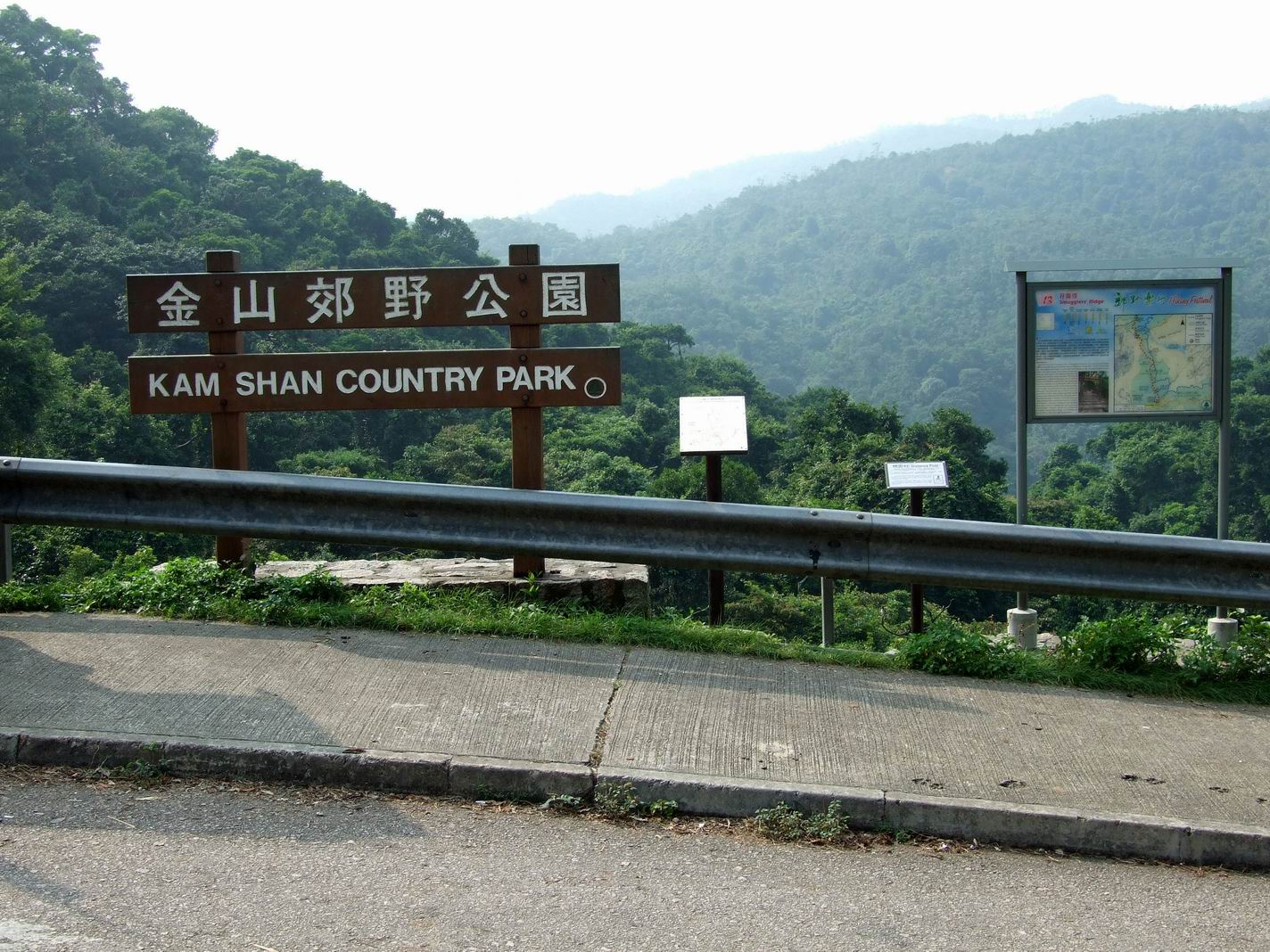 中文（香港）: 金山郊野公園